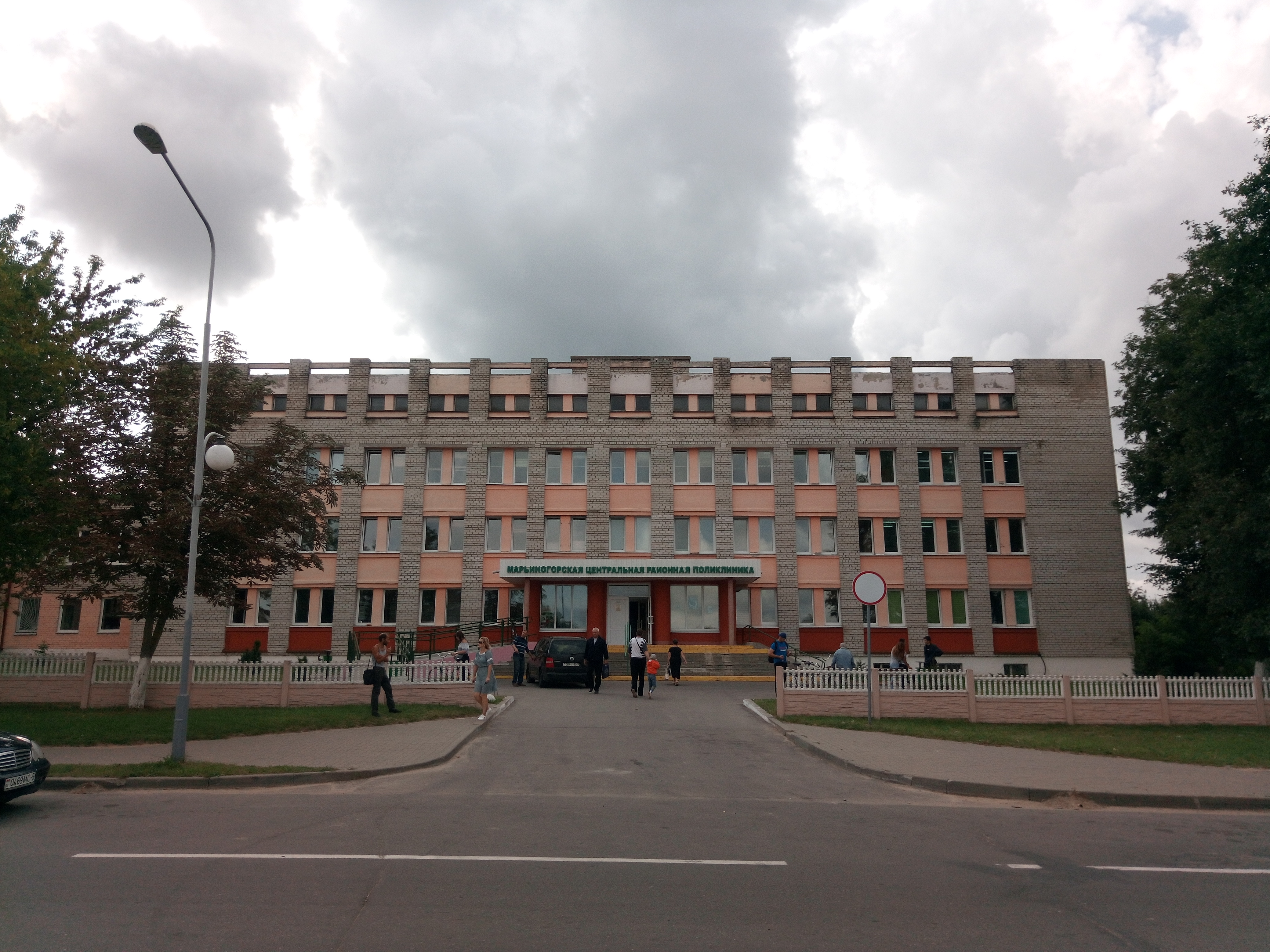 Мар’інагорская цэнтральная раённая паліклінікі.